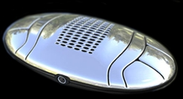 2012 - Nouvel instrument de musique produit par la société française TECHLODY et première application du système de composition musicale automatique MEDALsystem (MEDALcomposer)